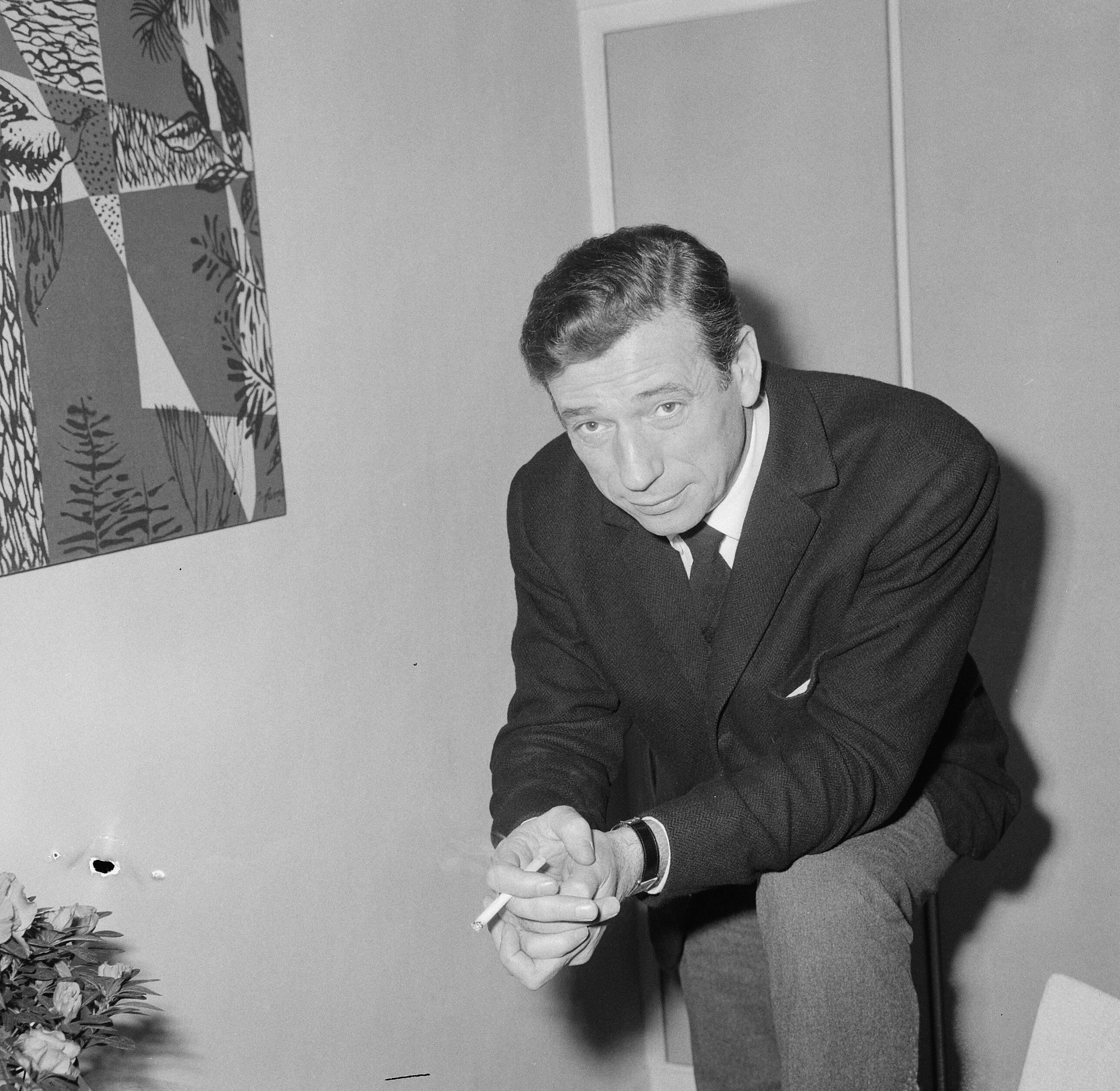 Collectie / Archief : Fotocollectie Anefo Reportage / Serie : [ onbekend ] Beschrijving : Yves Montand in ons land voor optreden in Koninklijke Schouwburg te Den Haag Datum : 9 februari 1965 Locatie : Den Haag, Zuid-Holland Trefwoorden : acteurs, filmsterren, zangers Persoonsnaam : Montand, Yves Fotograaf : Nijs, Jac. de / Anefo Auteursrechthebbende : Nationaal Archief Materiaalsoort : Negatief (zwart/wit) Nummer archiefinventaris : bekijk toegang 2.24.01.03 Bestanddeelnummer : 917-4145